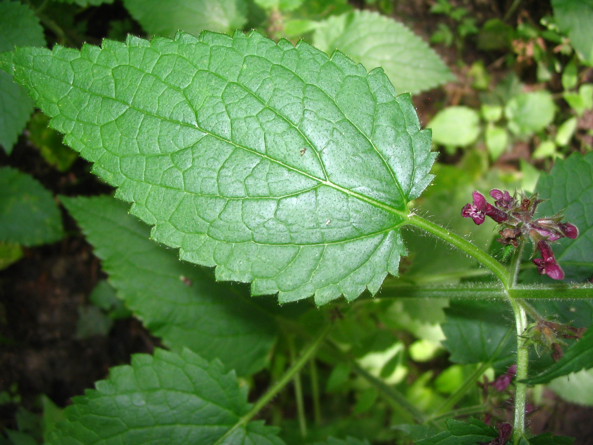 Stachys sylvatica - détail de la feuille